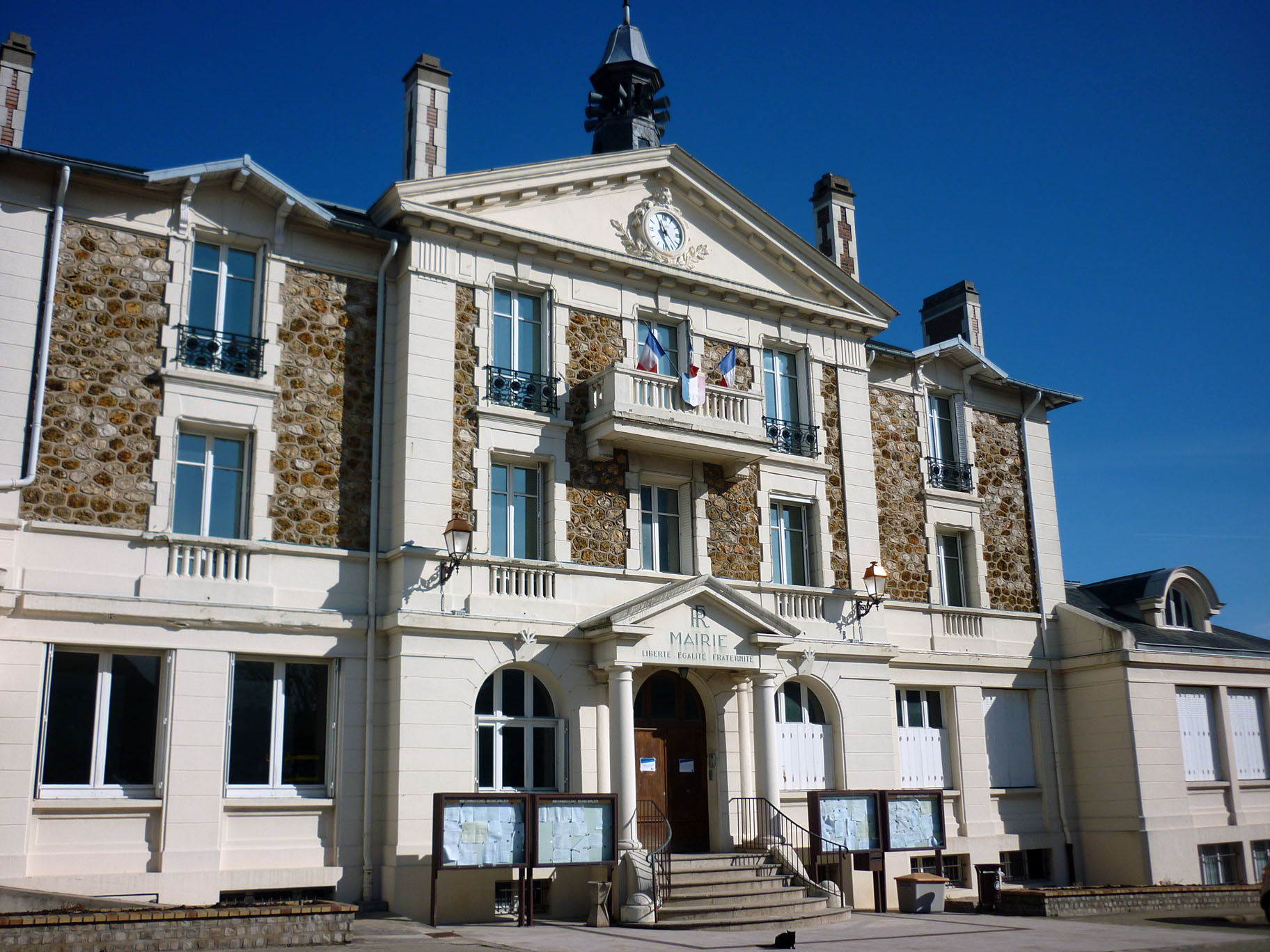 Mairie de Wissous, Essonne, France